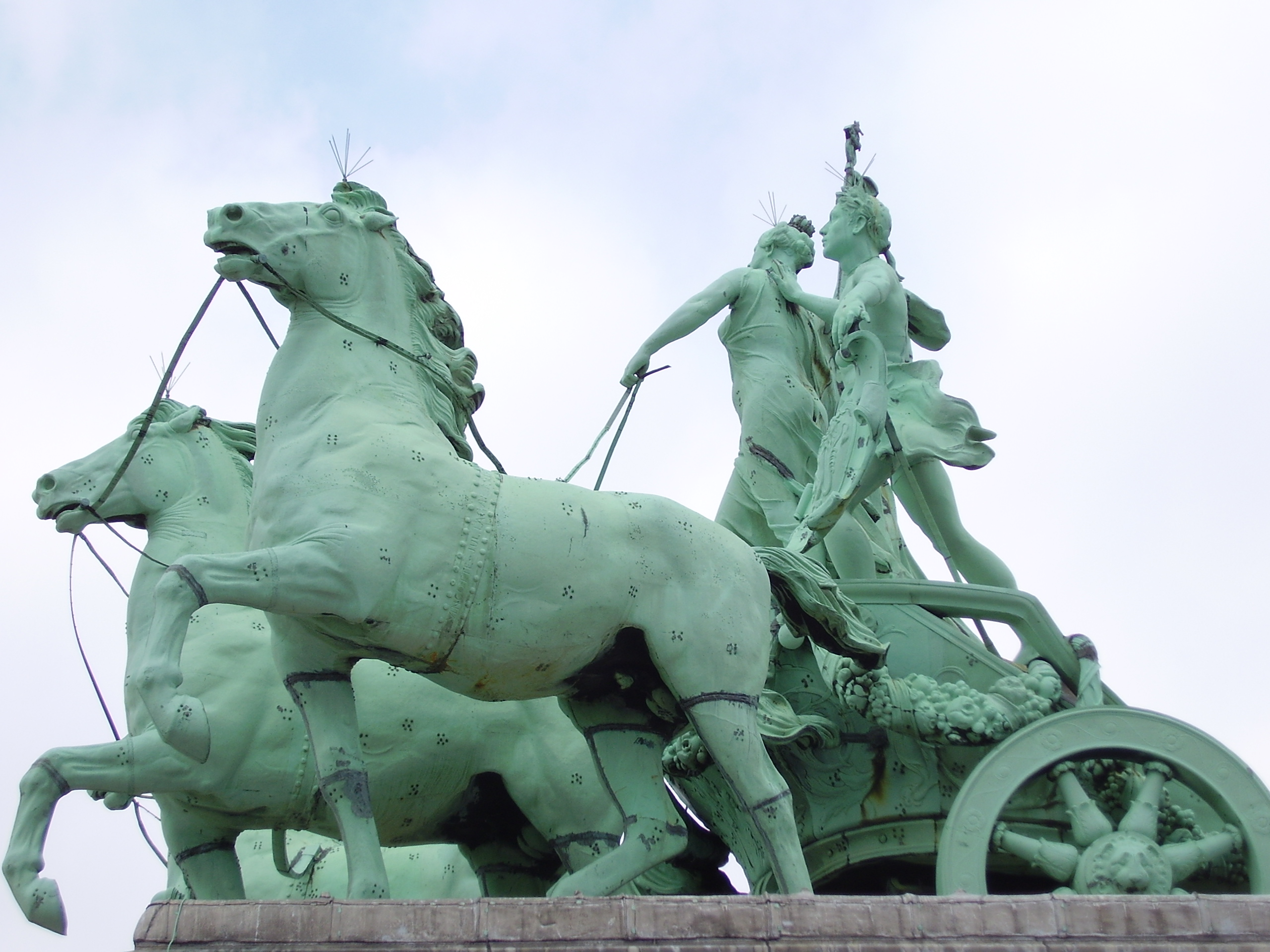 Description: Char du Cinquantenaire, Bruxelles Author: User:Ben2 Date of creation: 18 juin 2006 Source: Photo personnelle